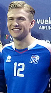 Islandzki piosenkarz Ari Ólafsson, maj 2018.